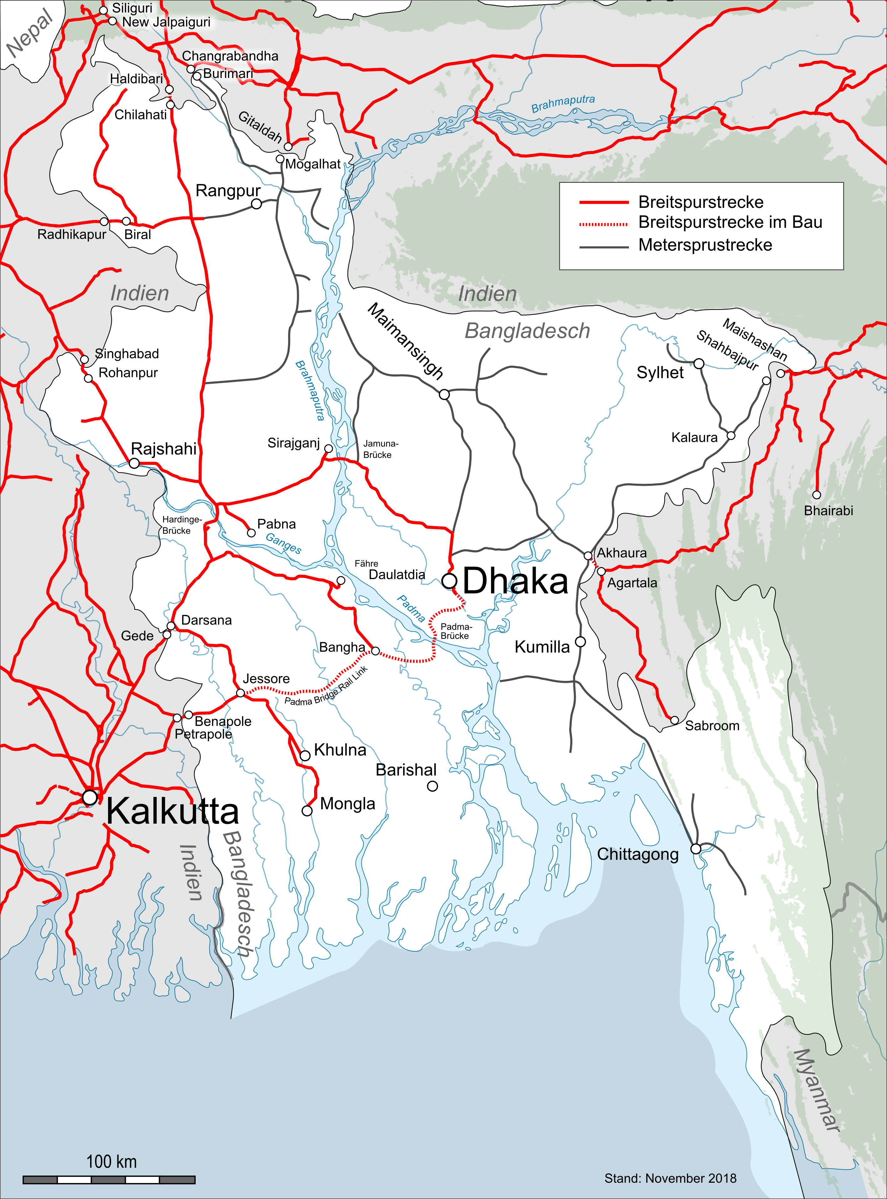 Schienenverkehr in Bangladesch: Grenzübergänge und Breitspurstrecken. Stand November 2018